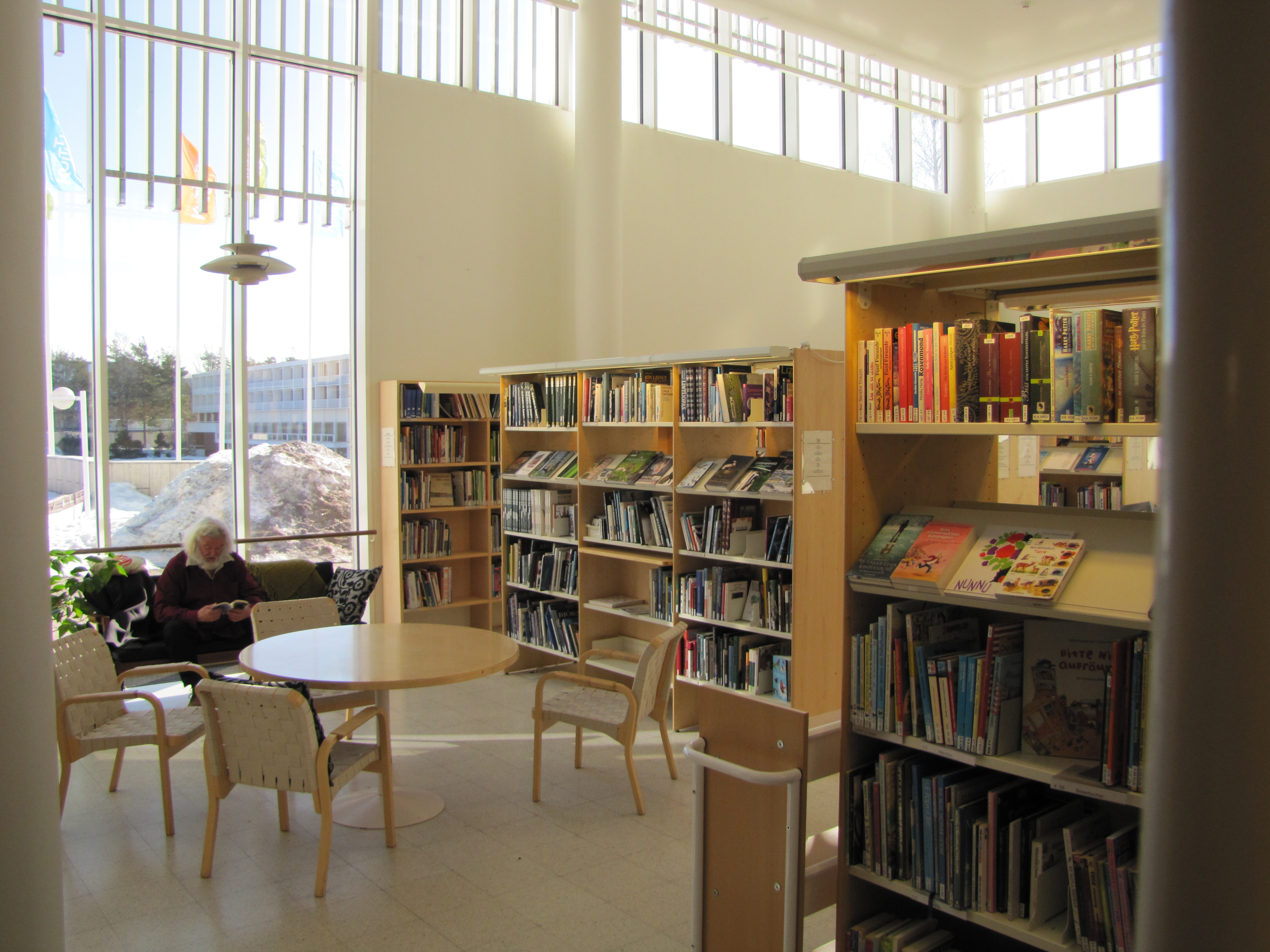 Aikuistenosasto, Tapiolan kirjasto. Kuva: Aila Kaunisvaara.